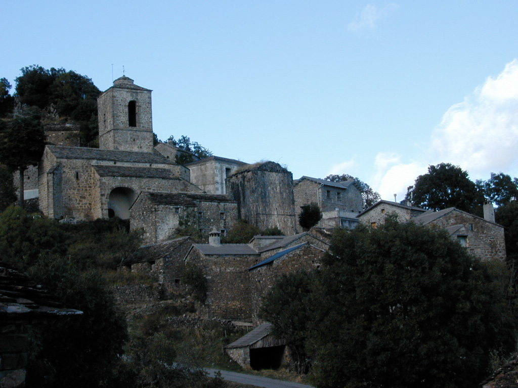 Panorámica de pequeño núcleo de montaña en el Pirineo Aragonés